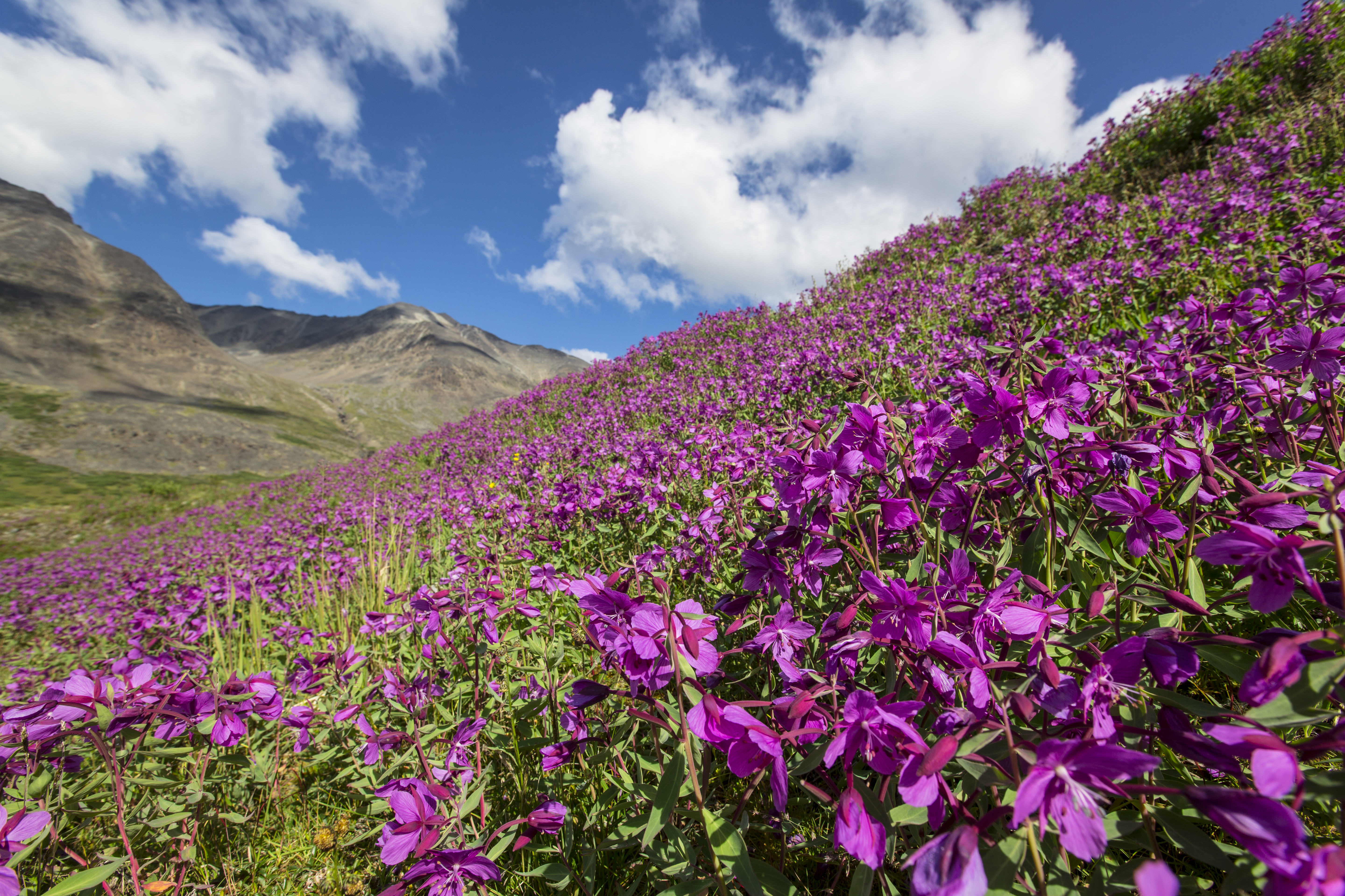 NPS / Jacob W. Frank